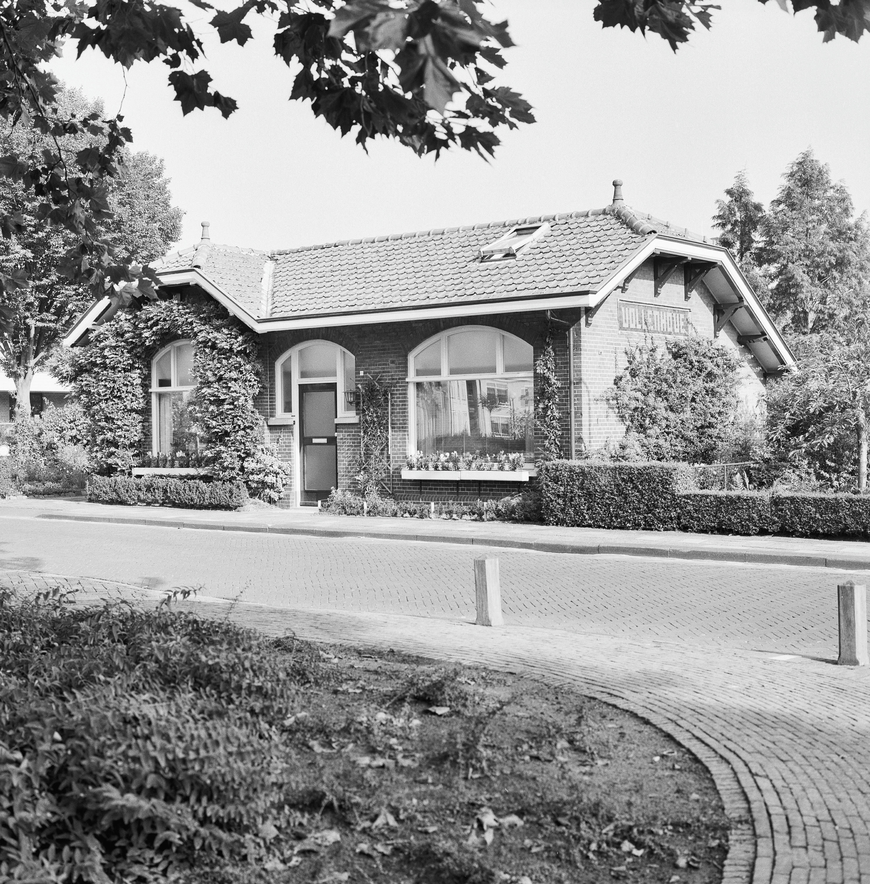 Tramstation/ Station: Overzicht voorgevel en rechter zijgevel, voormalig tramstation (opmerking: Gefotografeerd voor Monumenten In Nederland Overijssel)